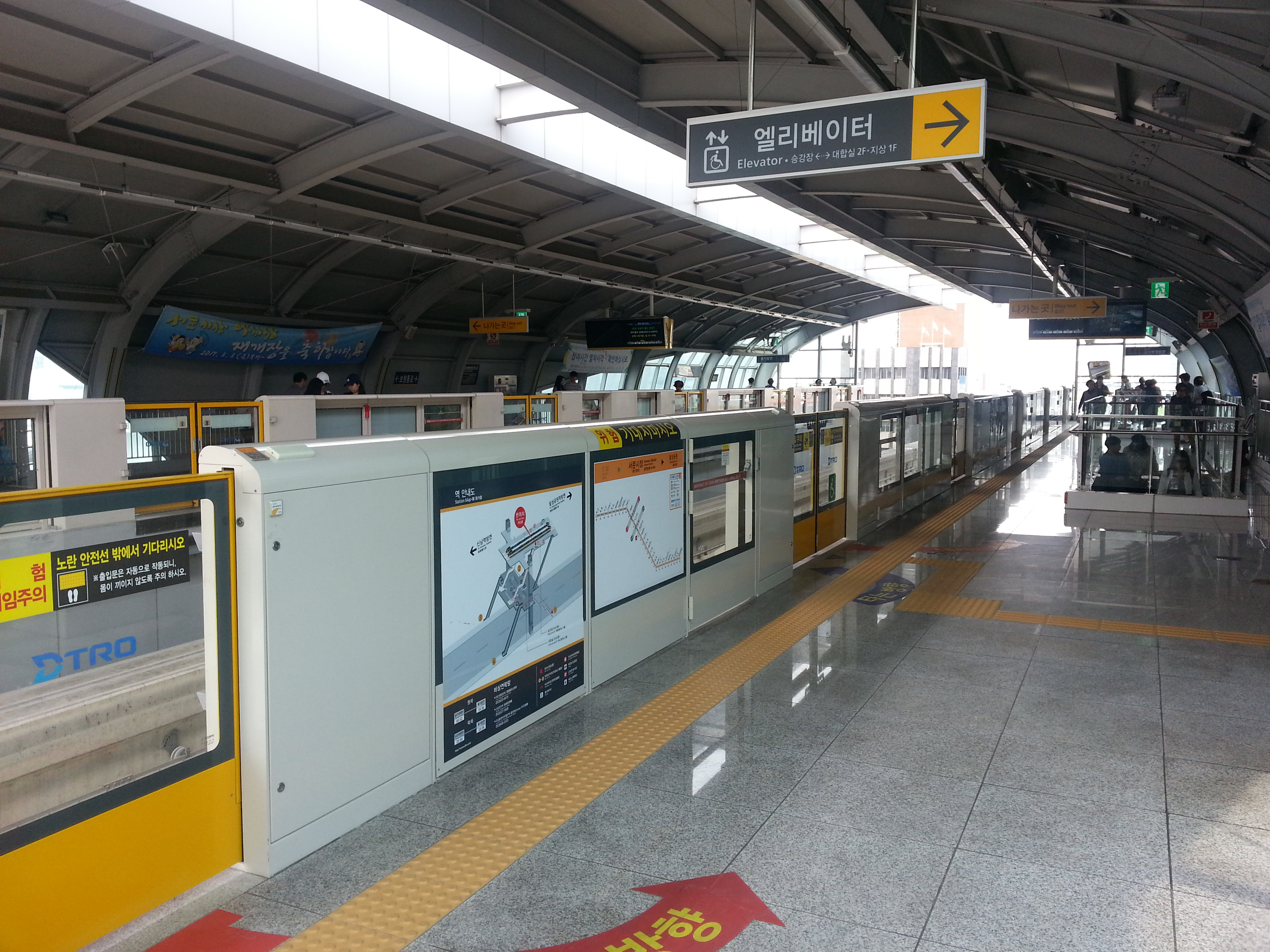 대구 도시철도 3호선 서문시장역 칠곡경대병원 방면 승강장